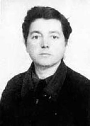 Ida Lazarévitch-Gilman, dite Ida Mett, née à Smorgone le 20 juillet 1901 et morte à Paris le 27 juin 1973, est un écrivain, syndicaliste révolutionnaire et libertaire de langue russe (date inconnue)